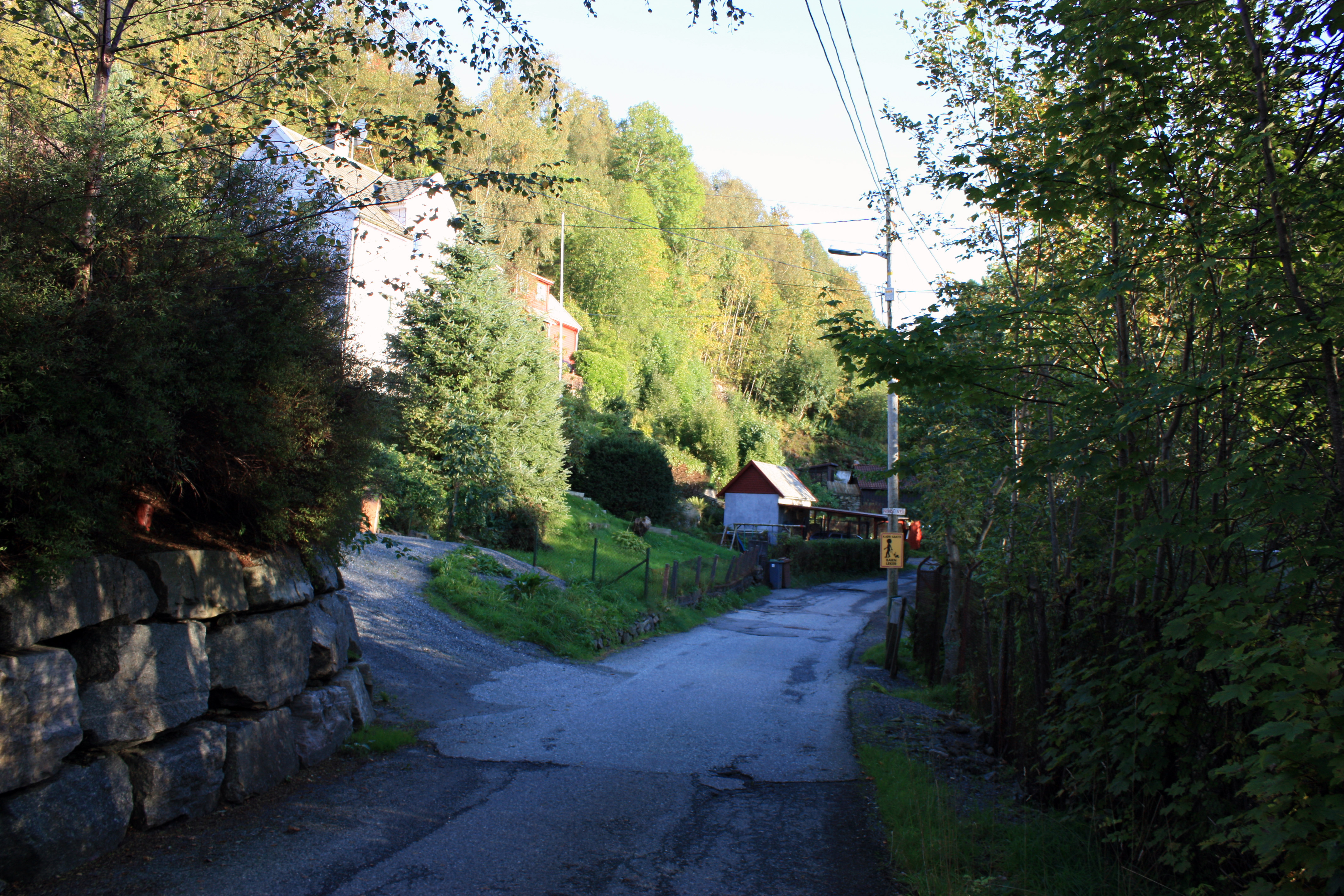 Ulsmågskaret, Fana, Bergen.